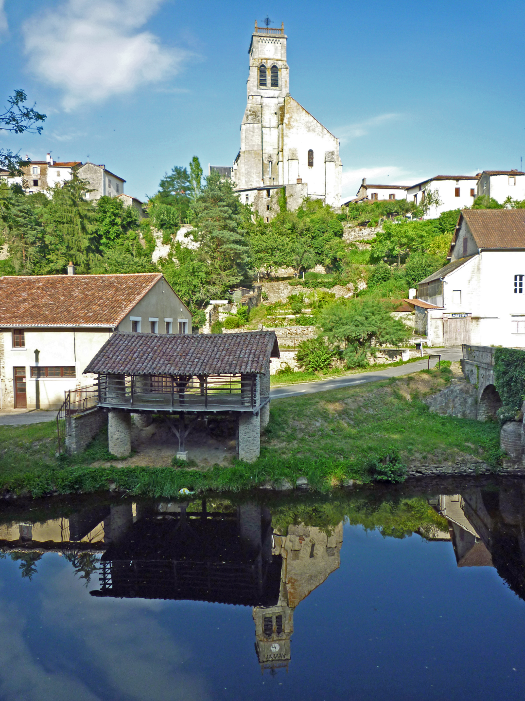 L'Église Notre-Dame-de-Bellac (XIIe et XIVe siècles) surplombant un ancien séchoir à peaux (XVe siècle)